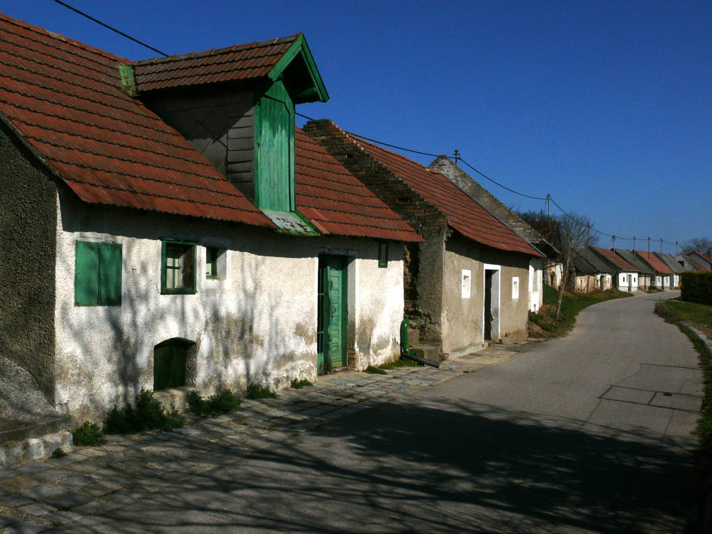 Groß Engersdorf; Kellergasse Satzgraben